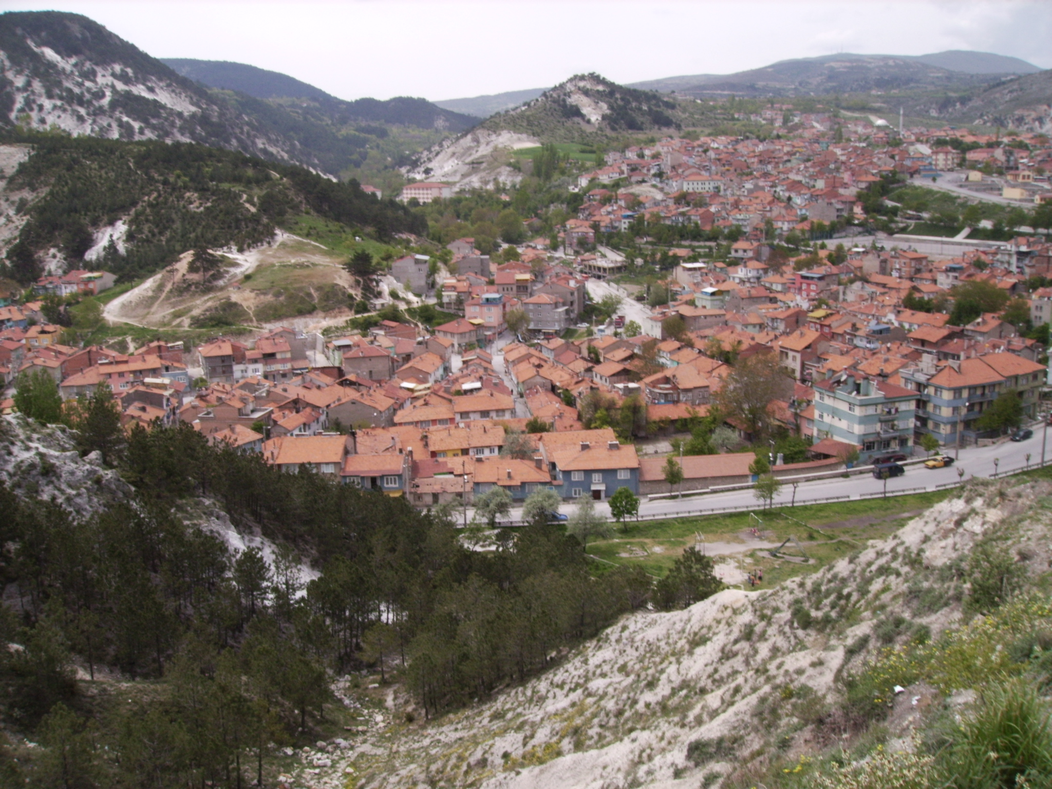 kütahya